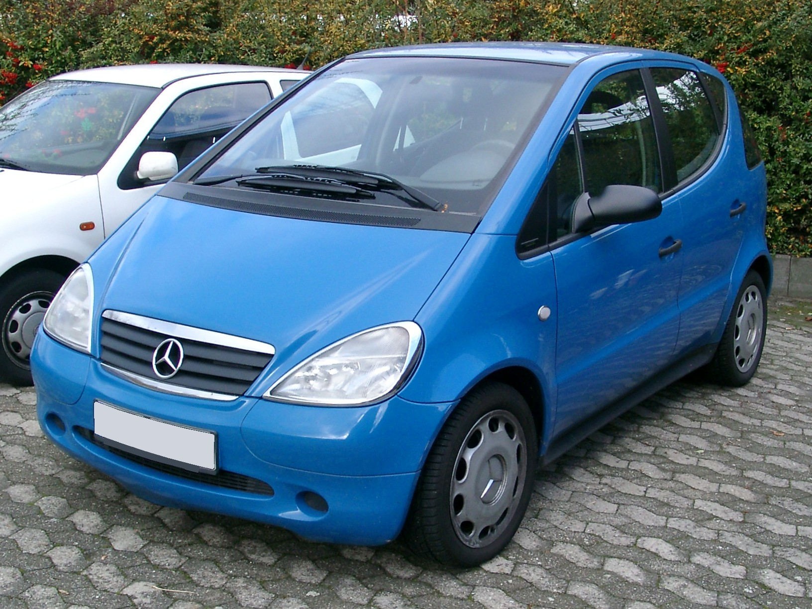 Mercedes-Benz W168 (A-Klasse)